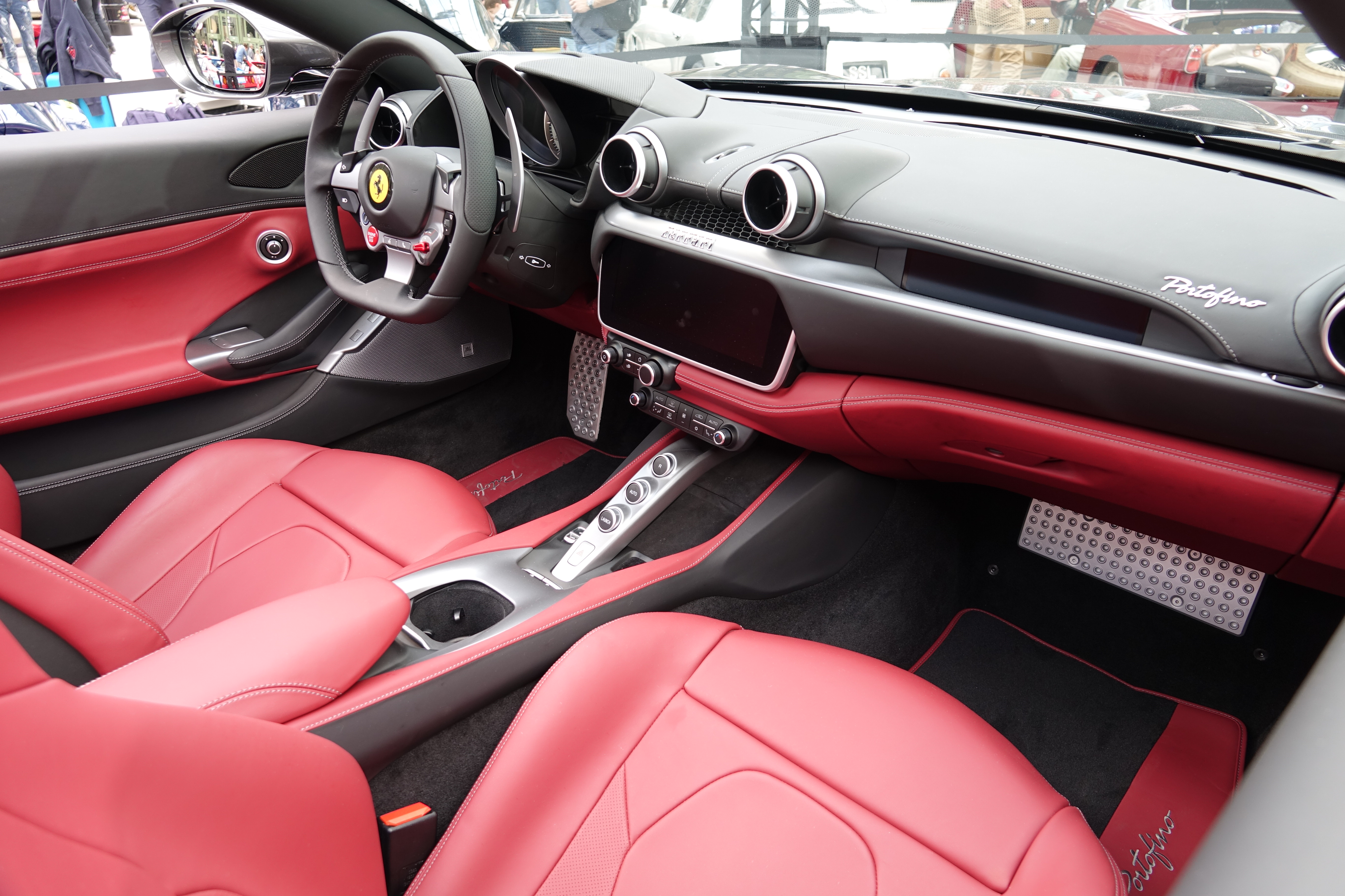 Tour Auto Optic 2000 (Édition 2018) au Grand Palais